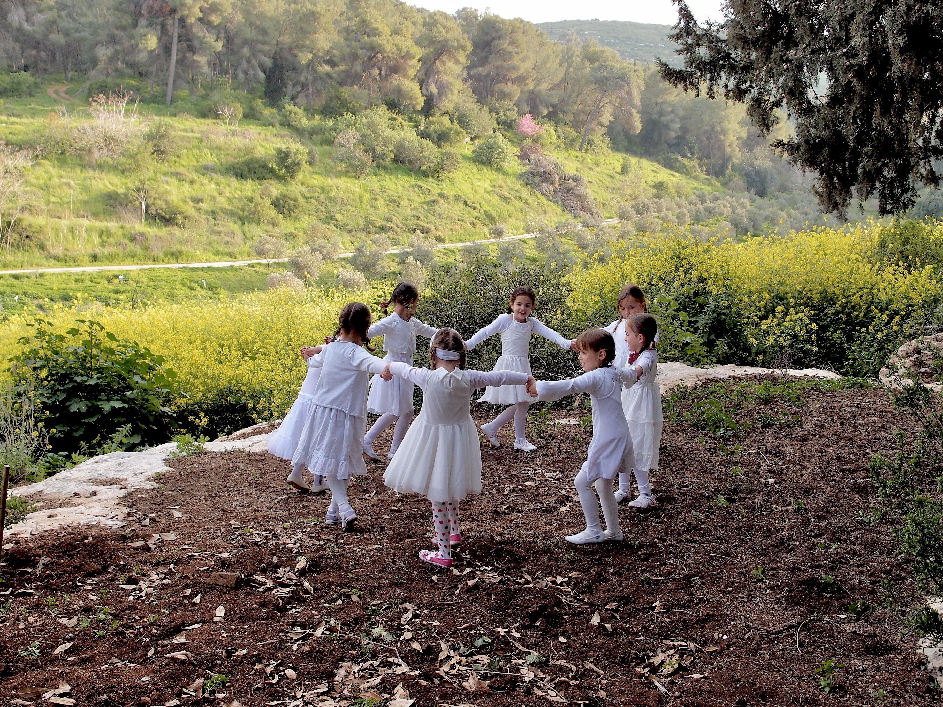 פעילות תרבותית במערת הפלמ"ח.